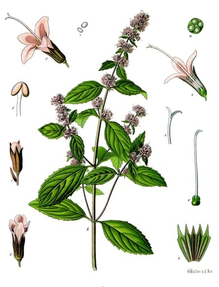 Pfefferminze. Mentha piperita L. A blühender Stengel in natürl. Grösse. 1 Knospe, vergrössert; 2 u. 3 Blüthe, desgl.; 4 dieselbe zerschnitten, desgl.; 5 Kelch aufgeschnitten, desgl.; 6 Staubgefäss, desgl.; 7 Pollen, desgl.; 8 Stempel, desgl.; 9 oberer Theil des Griffels mit Narben, desgl.; 10 Fruchtknoten im Querschnitt, desgl.